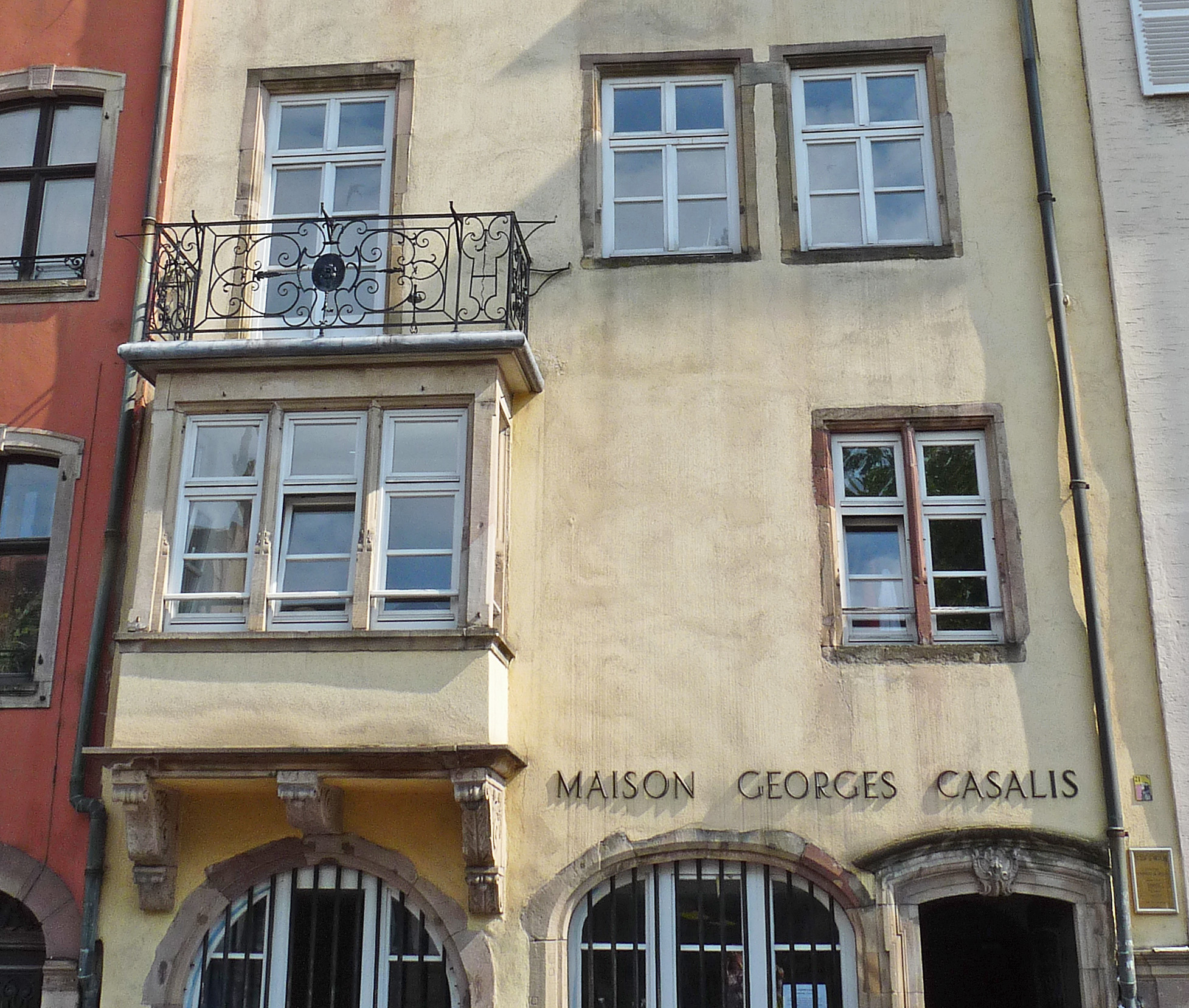 Strasbourg : Maison, 13 quai Saint-Nicolas. Construite en 1587, rénovée, inscrite aux Monuments historiques en 1929.